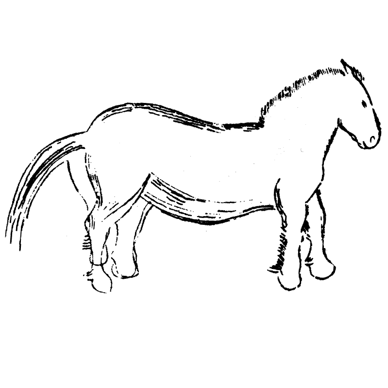 Caballo grabado del panel número 50, de la Galería B (segundo santuario) de la Cueva de La Pasiega, en el monte Castillo, localidad de Puente Viesgo (Cantabria, España)